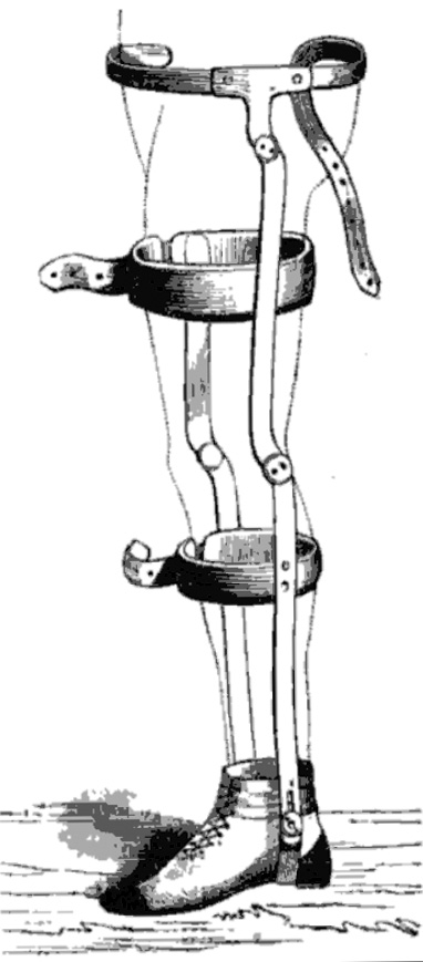 Darstellung einer Orthese im Buch Traité de thérapeutique des maladies articulaires von Amédée Bonnet.